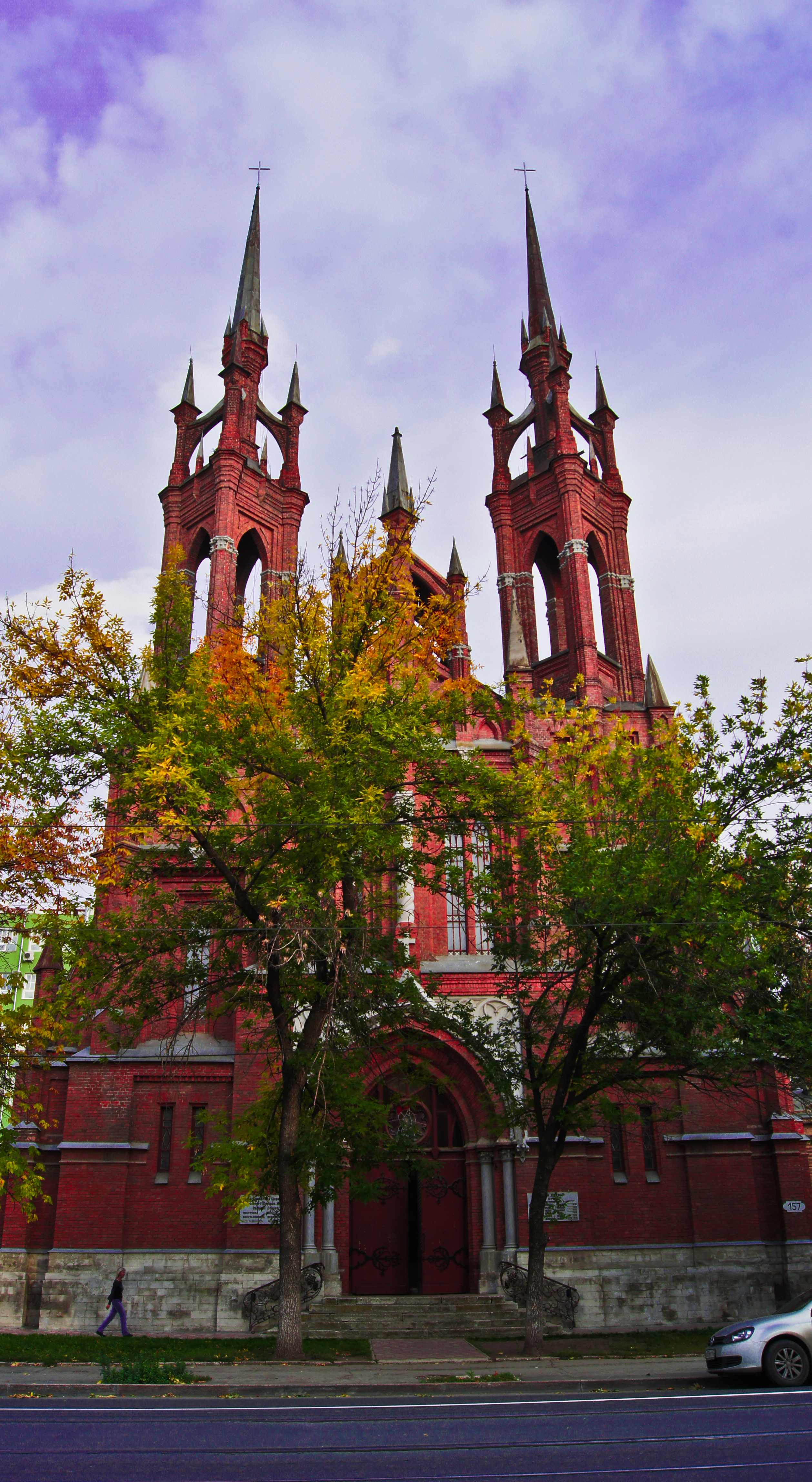 Польский костёл, католический храм в Самаре